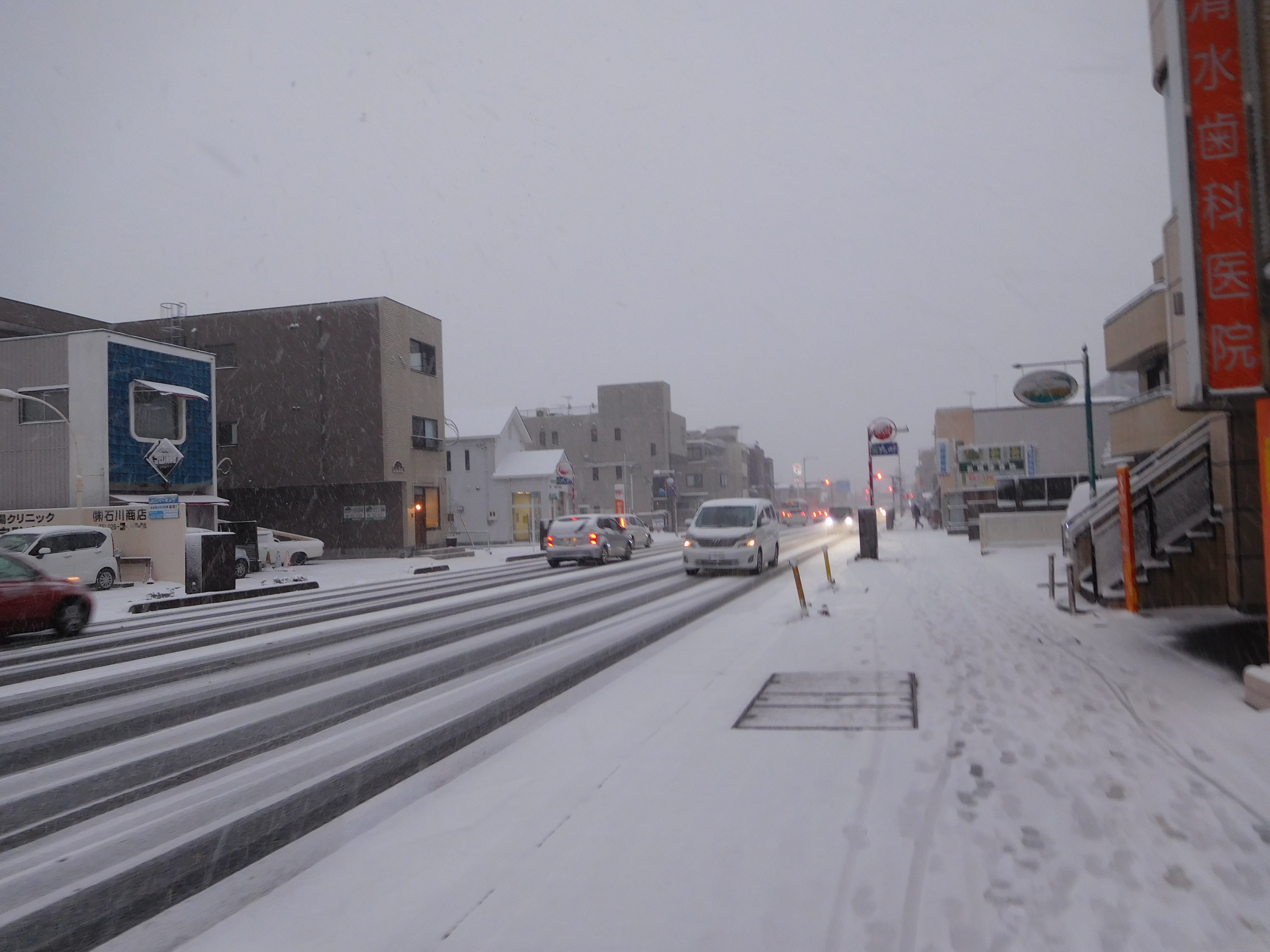 栃木県宇都宮市、材木町通り付近の降雪の様子（2018年1月22日）。